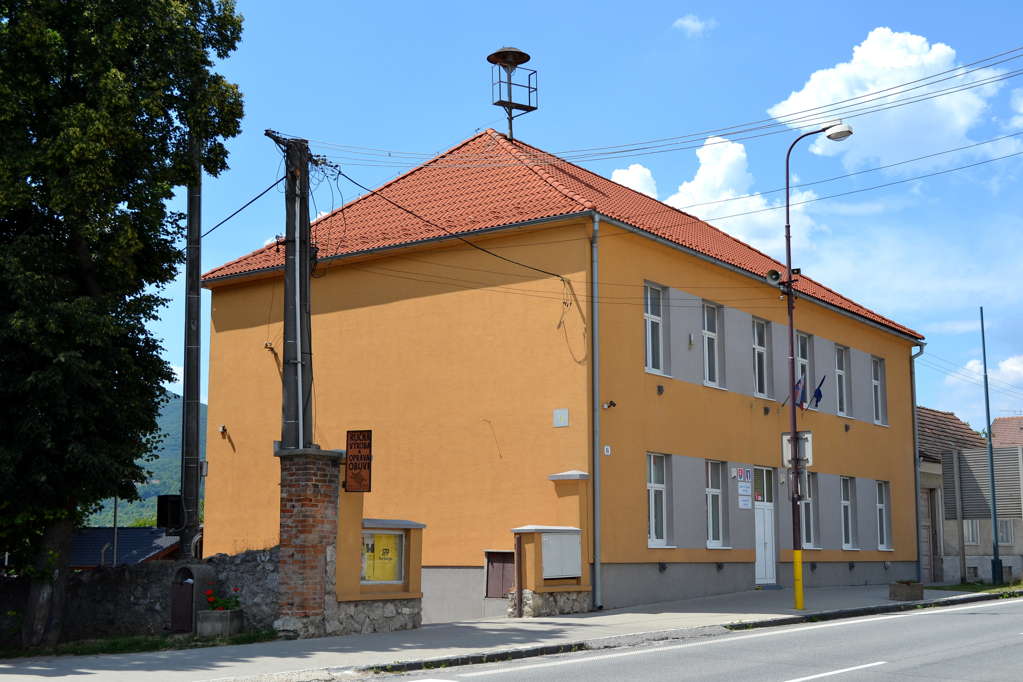 Budova obecného úradu v Trstíne